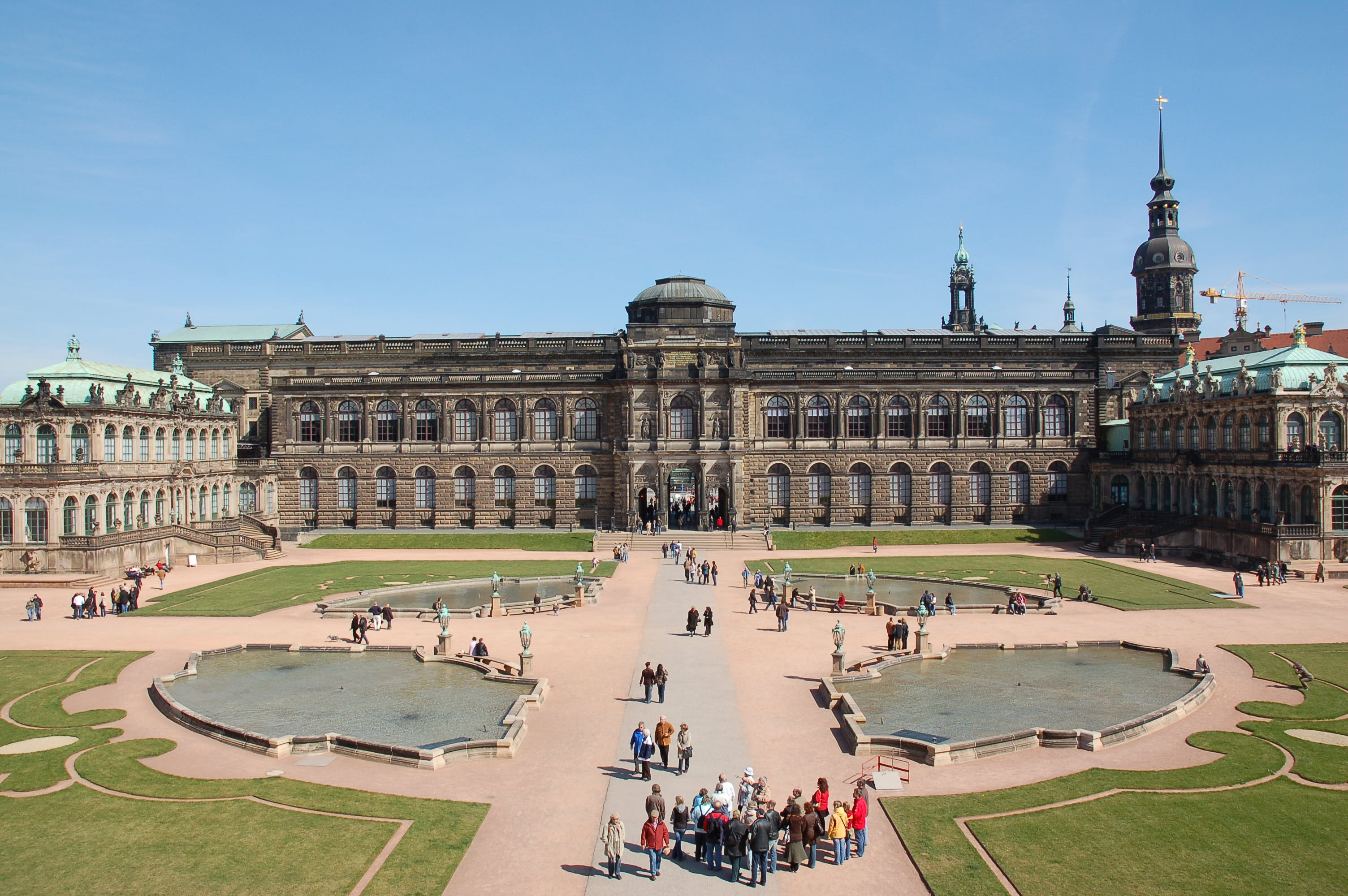 Zwinger, Dresden